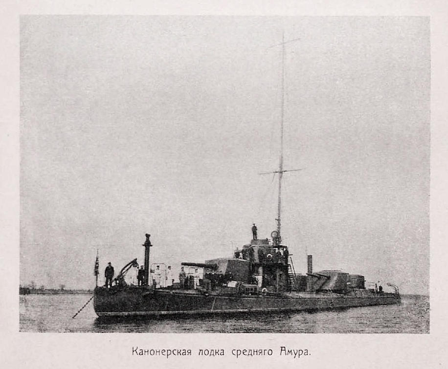 Данное изображение было использовано в статье «Амурская флотилия» опубликованной во втором томе «Военной энциклопедии», который был издан книгоиздательским товариществом Ивана Дмитриевича Сытина в 1911 году в столице Российской империи городе Санкт-Петербурге.